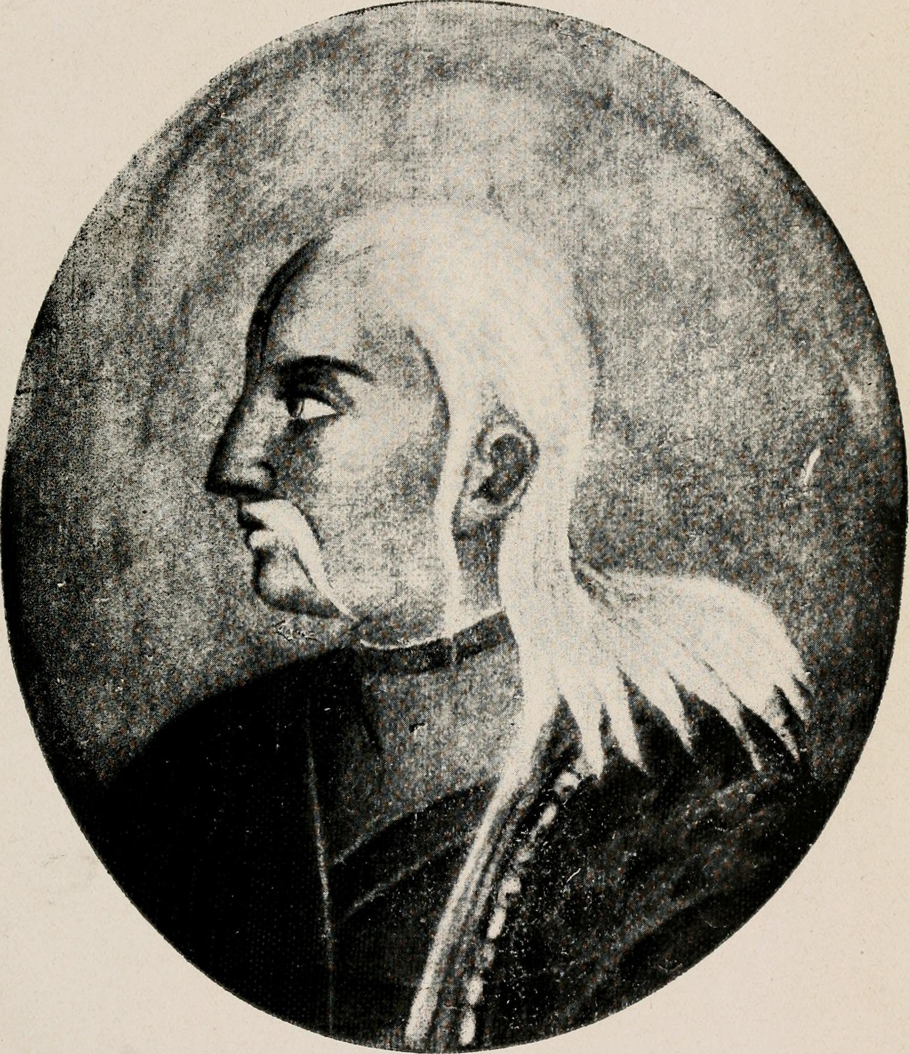 Shahu Chhatrapati Shivaji II